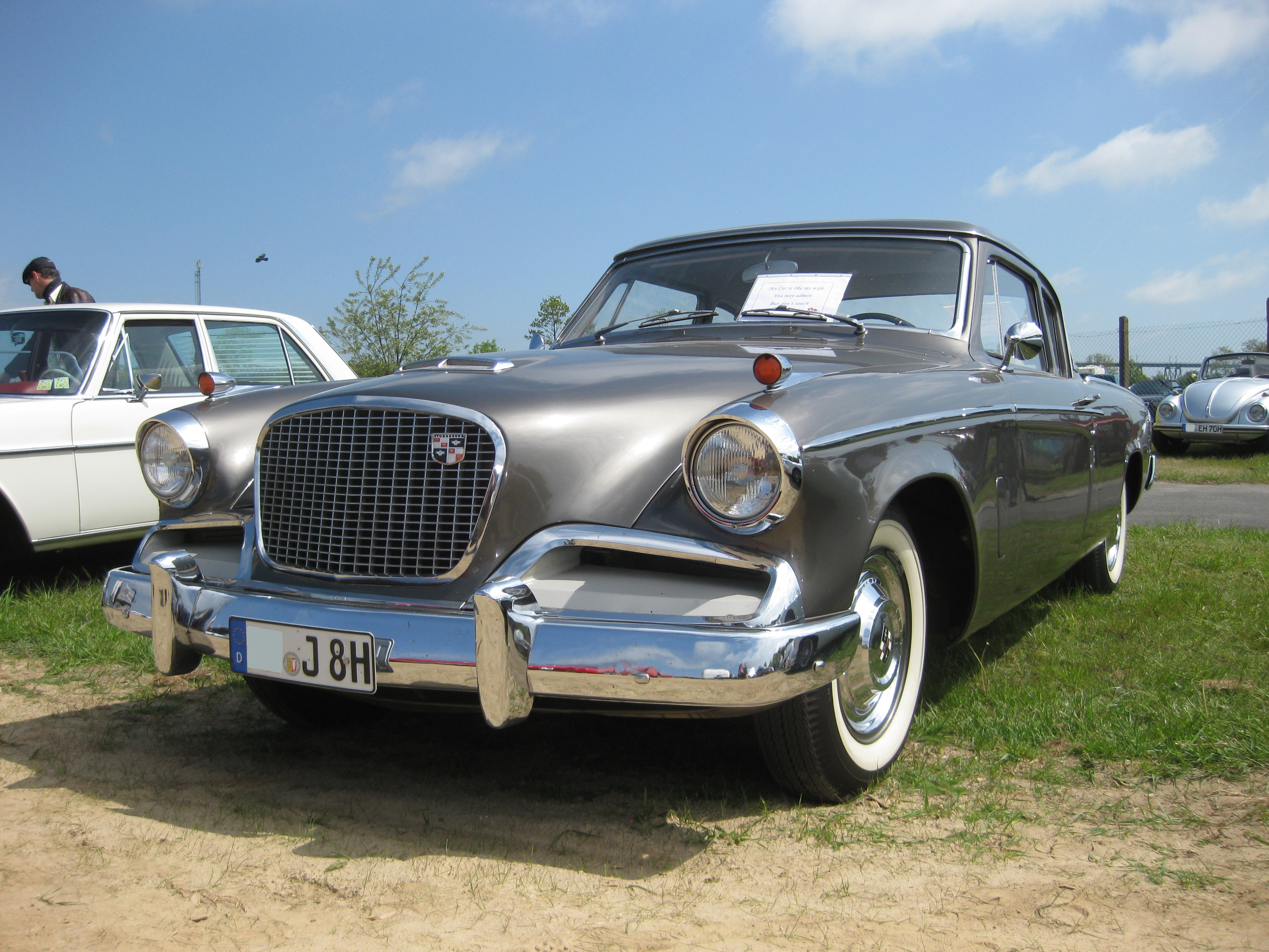 Studebaker Flight Hawk Frontansicht